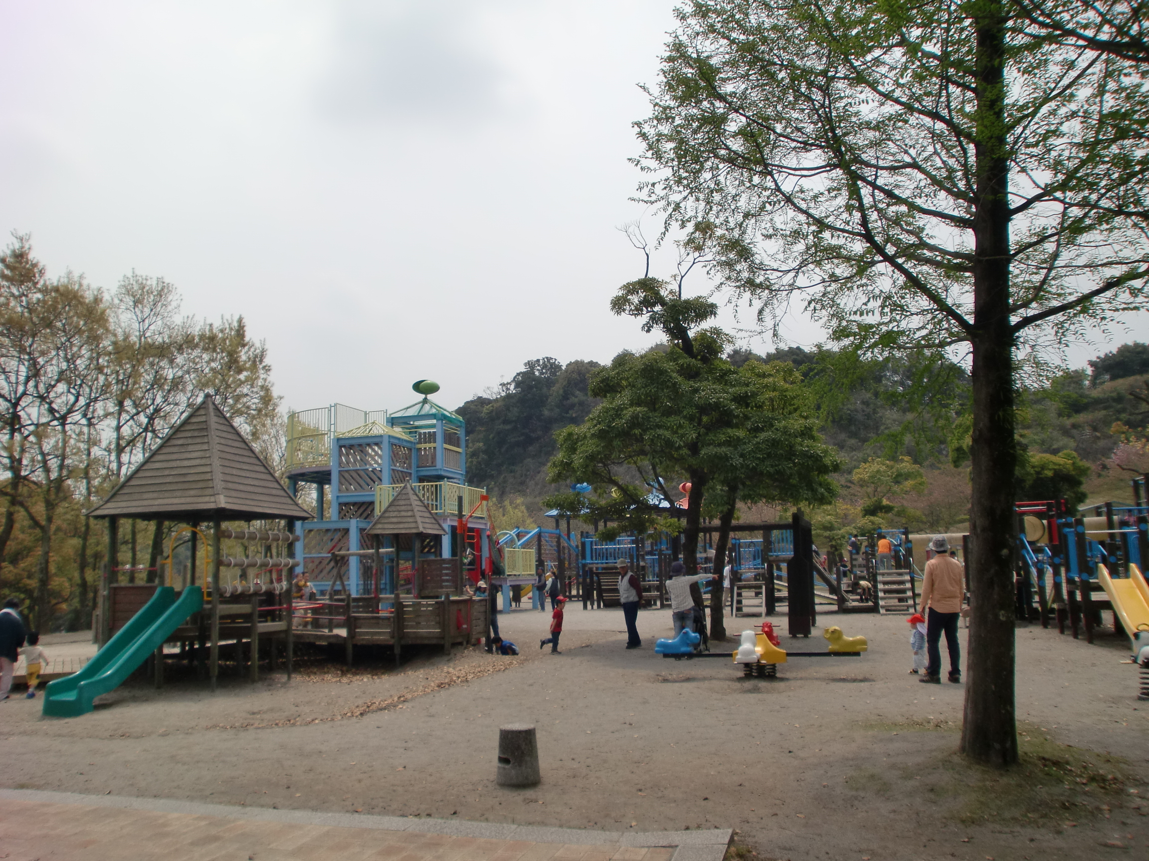 かごしま健康の森公園の遊具